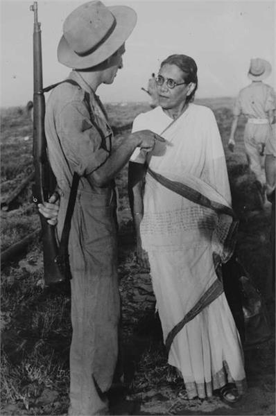 העוגן - הגברת רבקה ראובן, מנהלת ביה"ס ע"ש כדורי לבני ישראל בבומבי, באה לראות את הקמת הישוב החדש "העוגן"